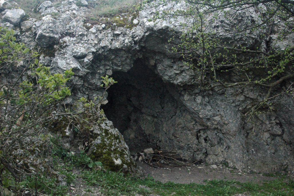 Leiser Berge in spring